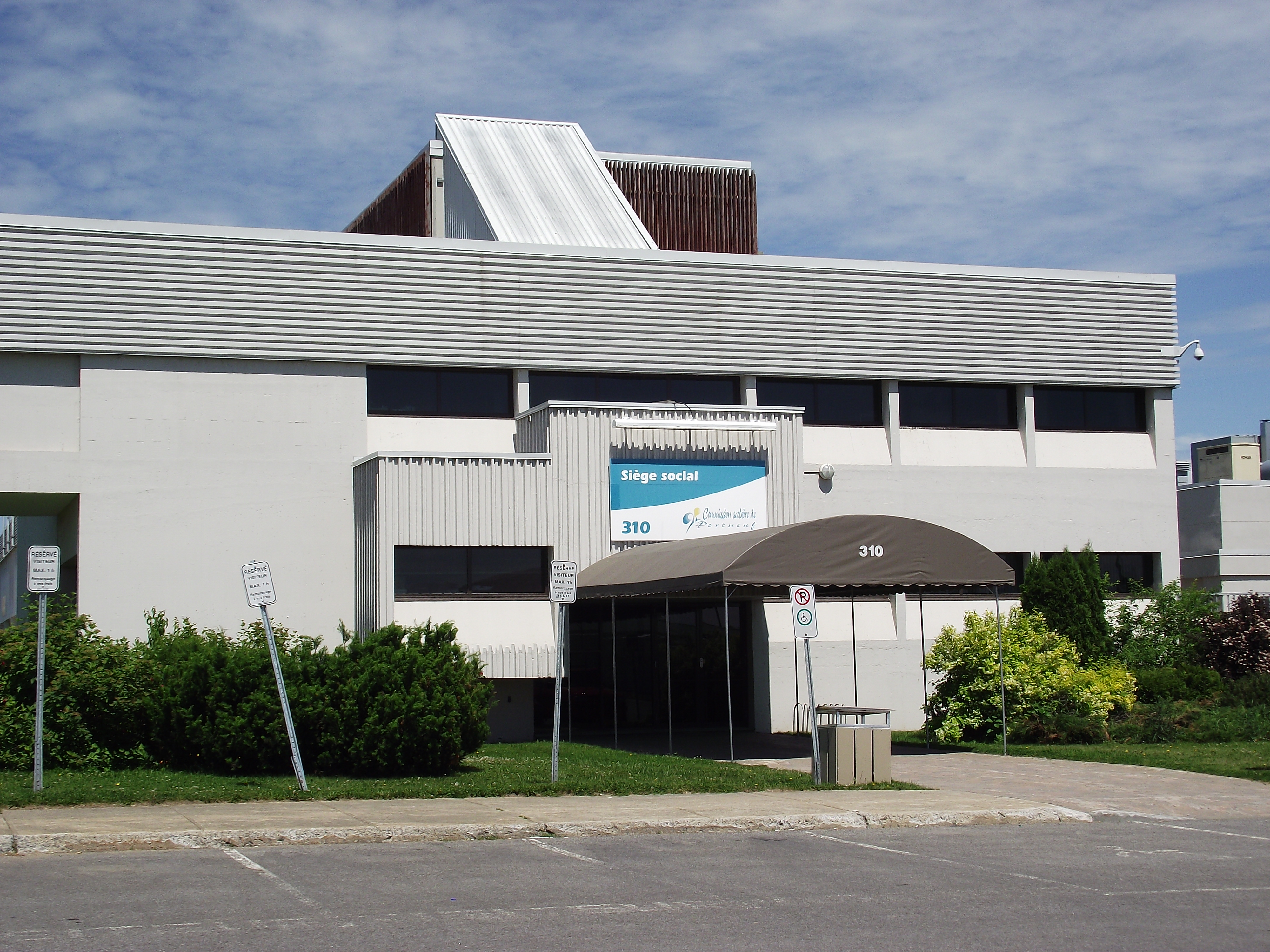 Image de Donnacona provenant du concours Wikipédia prend Québec.